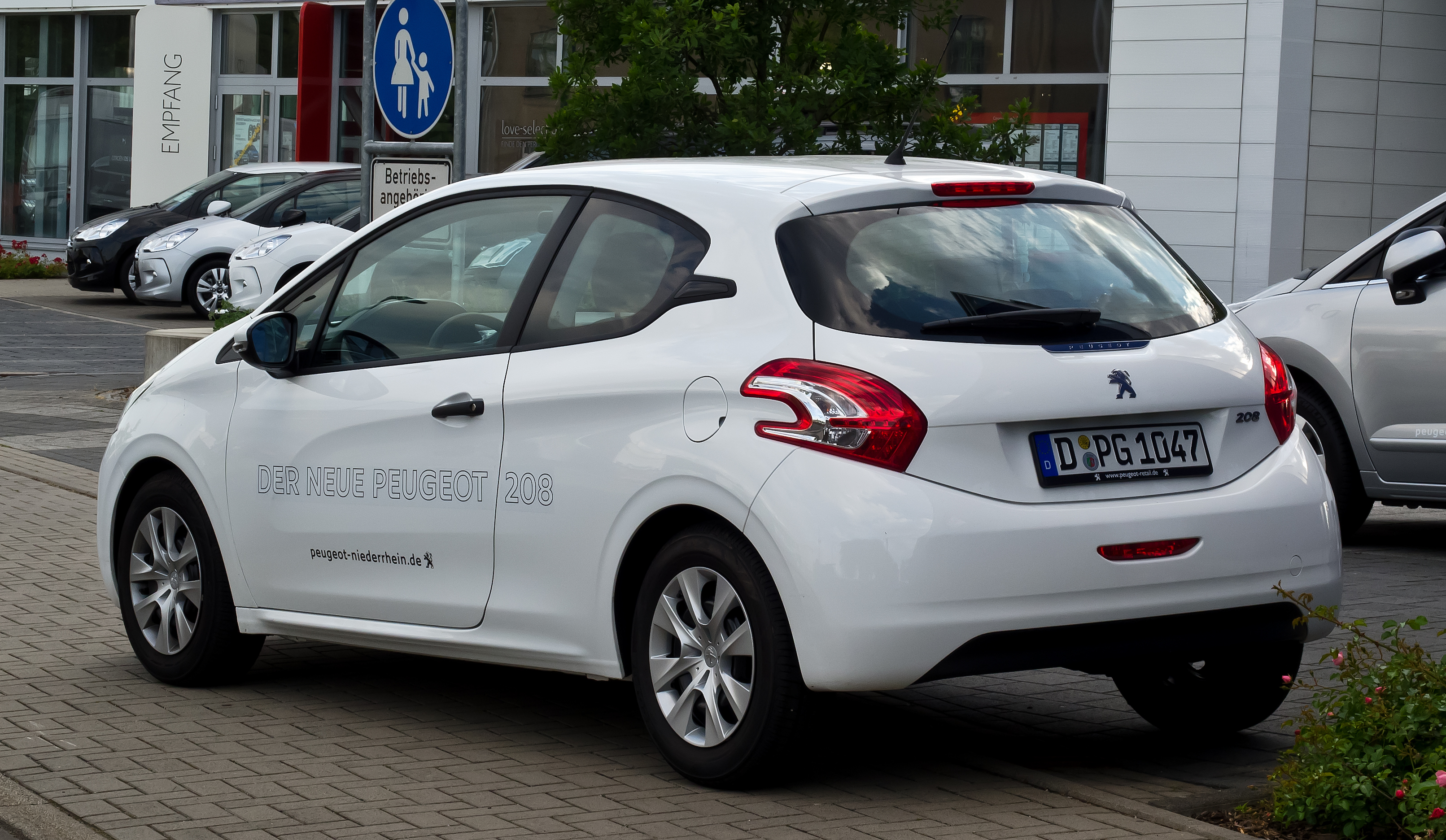 Peugeot 208 68 VTi Access